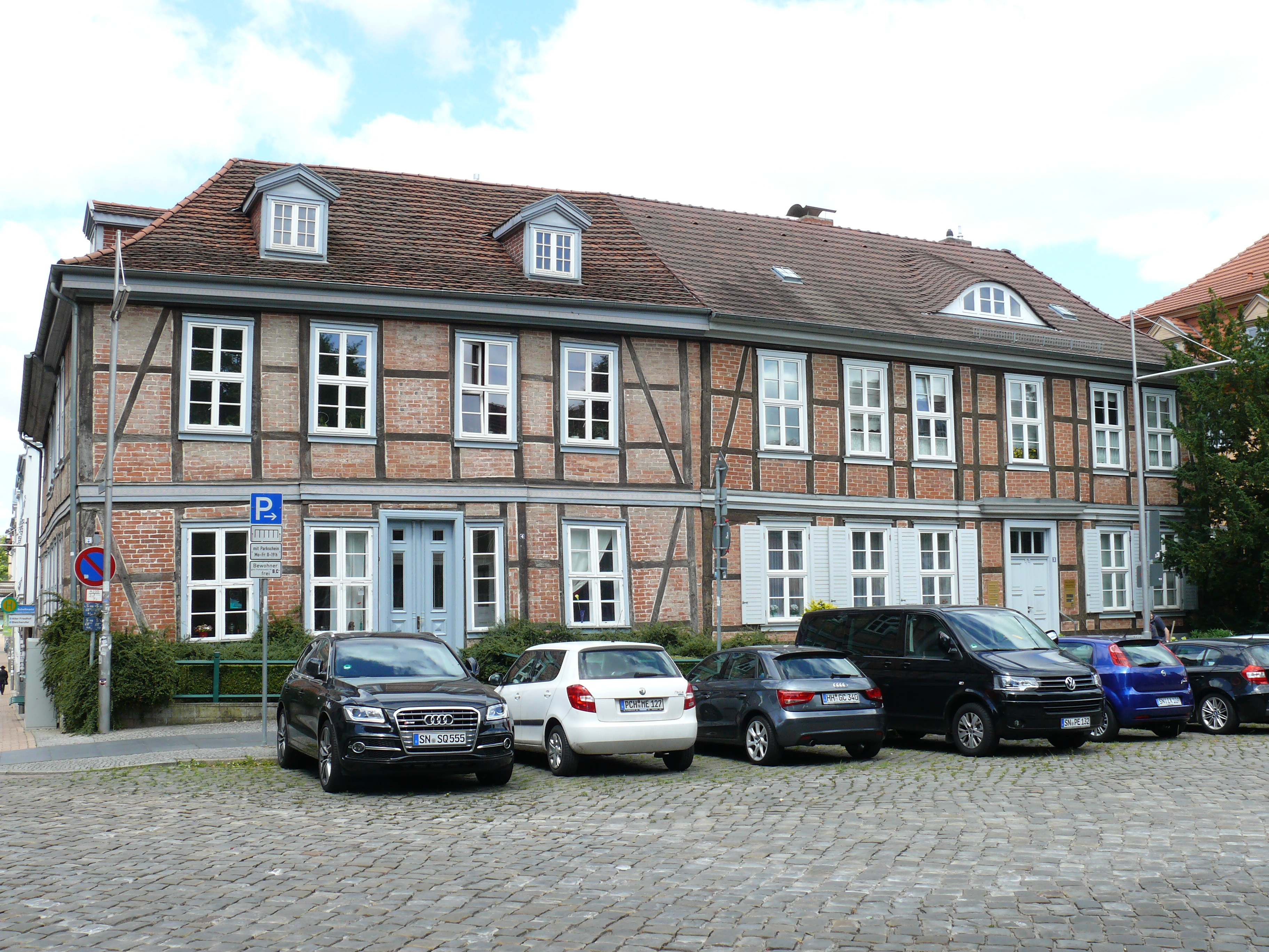 Die Gebäude "Schelfmarkt 3 (rechts) + 4 (links)" in Schwerin.